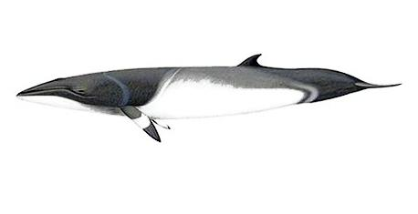 Rorcual albiblanco (Balaenoptera acutorostrata), también conocido como ballena de minke común y ballena enana